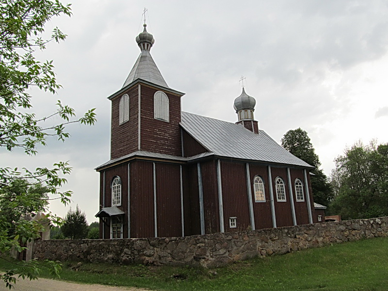 Вострава. Царква Міхала Арханёла